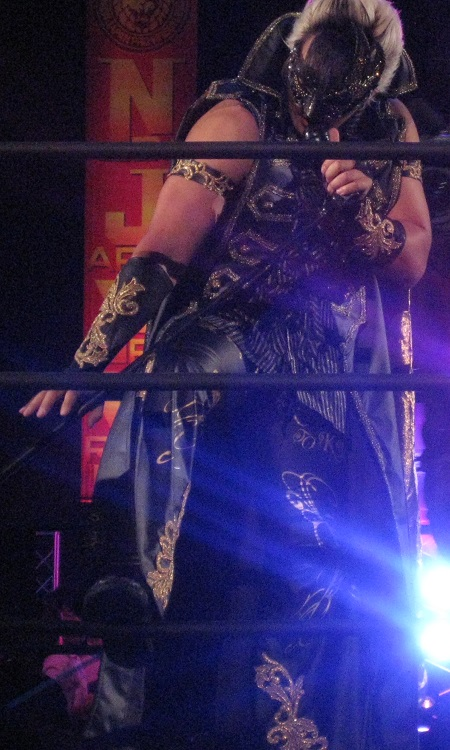 2014年9月21日 神戸ワールド記念ホール 「DESTRUCTION in KOBE」 タイチ